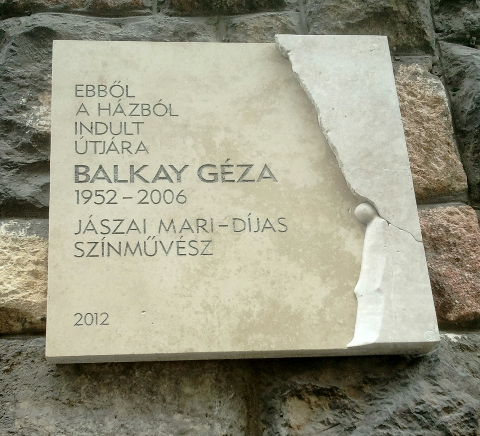 Balkay Géza emléktáblája (Stremeny Géza, 2012) Budapest I. kerület Mészáros utca 10.